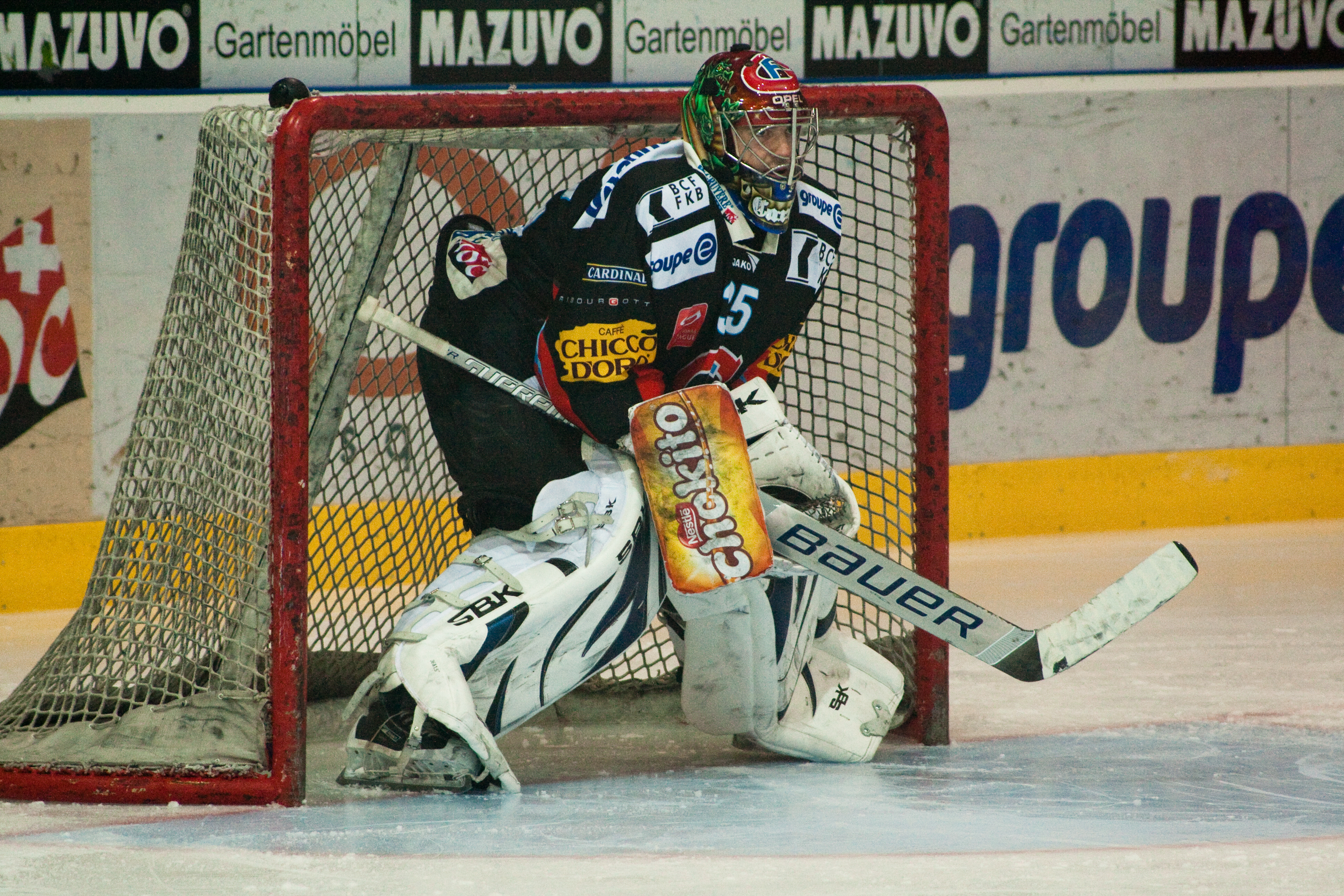 Sébastien Caron dans les buts de Fribourg-Gottéron. Match de hockey en Suisse.